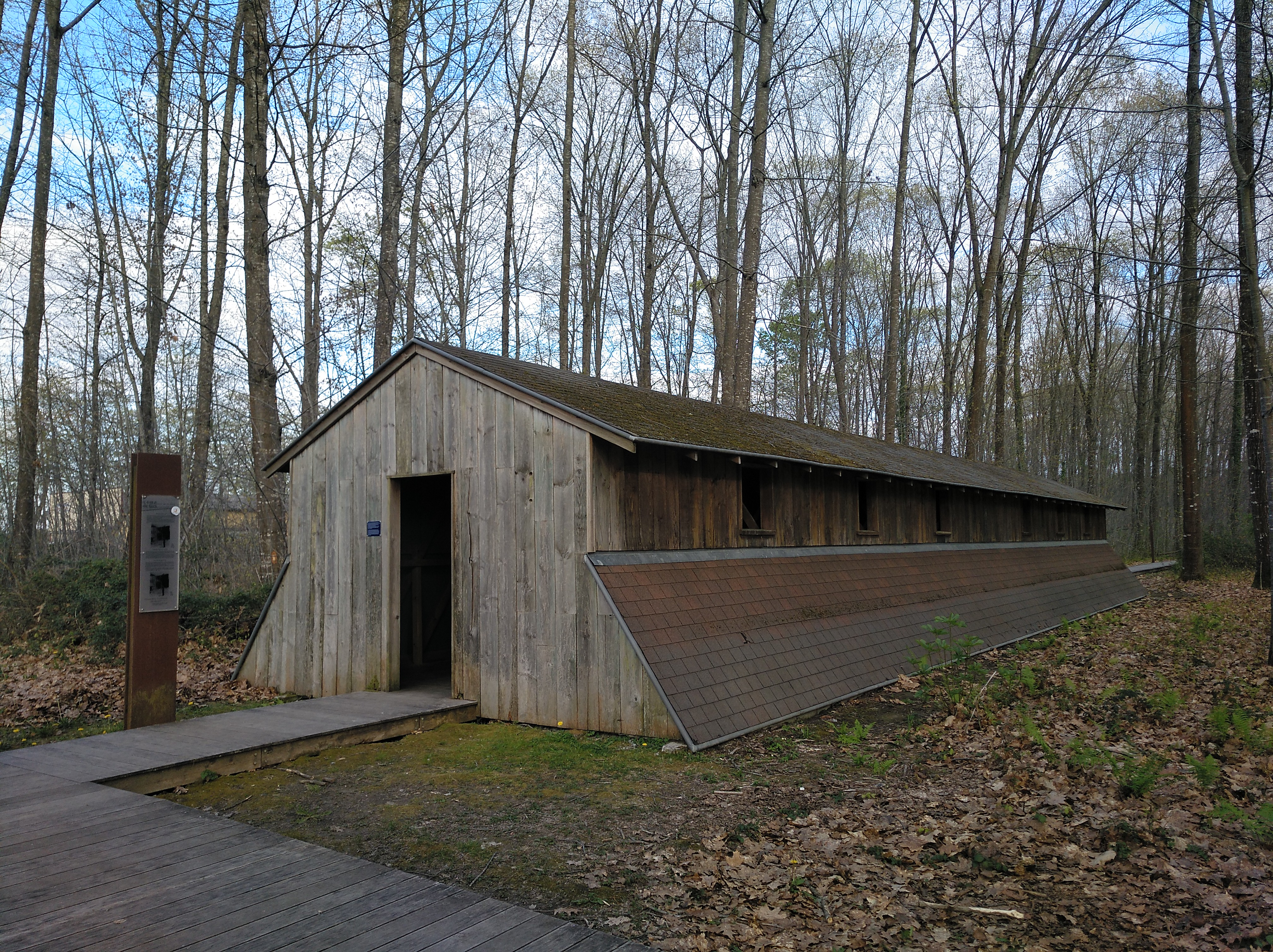 Itxuratutako barrakoi bat, Gurseko esparrua, Bearno